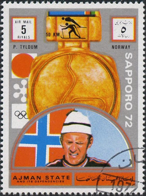 Pål Tyldum